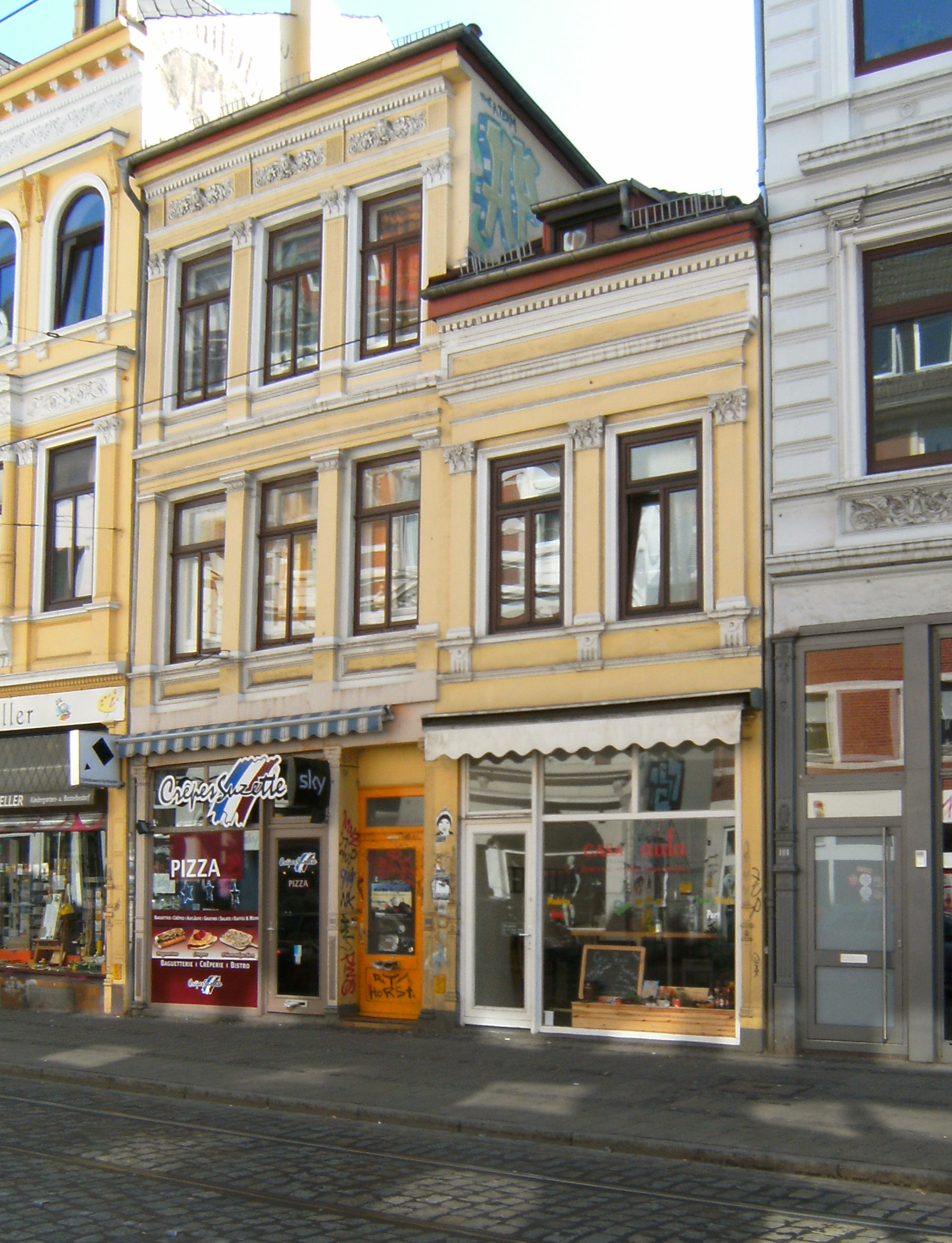 Wohnhaus in Bremen, Ostertorsteinweg 102+103.Haus Nr. 102 (rechts) ist ein geschütztes Kulturdenkmal in der Freien Hansestadt Bremen, mit der Nr. 0984 beim Landesamt für Denkmalpflege registriert. Haus Nr. 103 (links) ist ein geschütztes Kulturdenkmal in der Freien Hansestadt Bremen, mit der Nr. 0985 beim Landesamt für Denkmalpflege registriert.